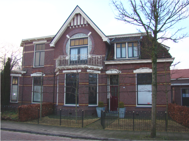 Gemeentemonument in Bredevoort